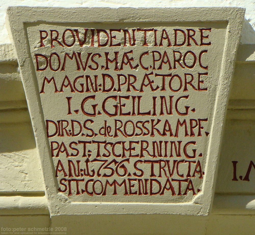 Portaldetail vom Pfarrhaus bei der evang. Kirche in Heilbronn-Frankenbach